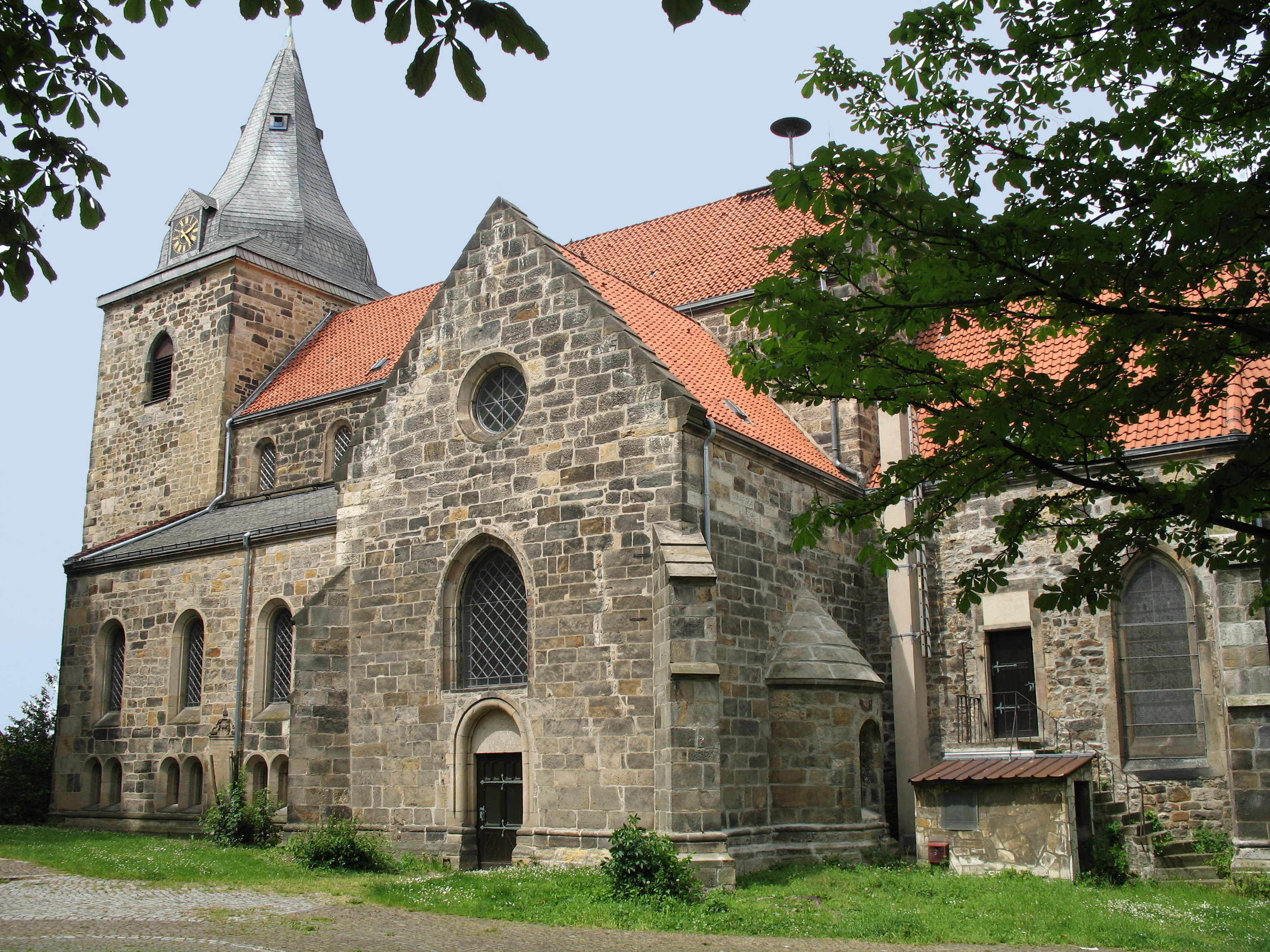 Michaeliskirche, Ronnenberg, Germany